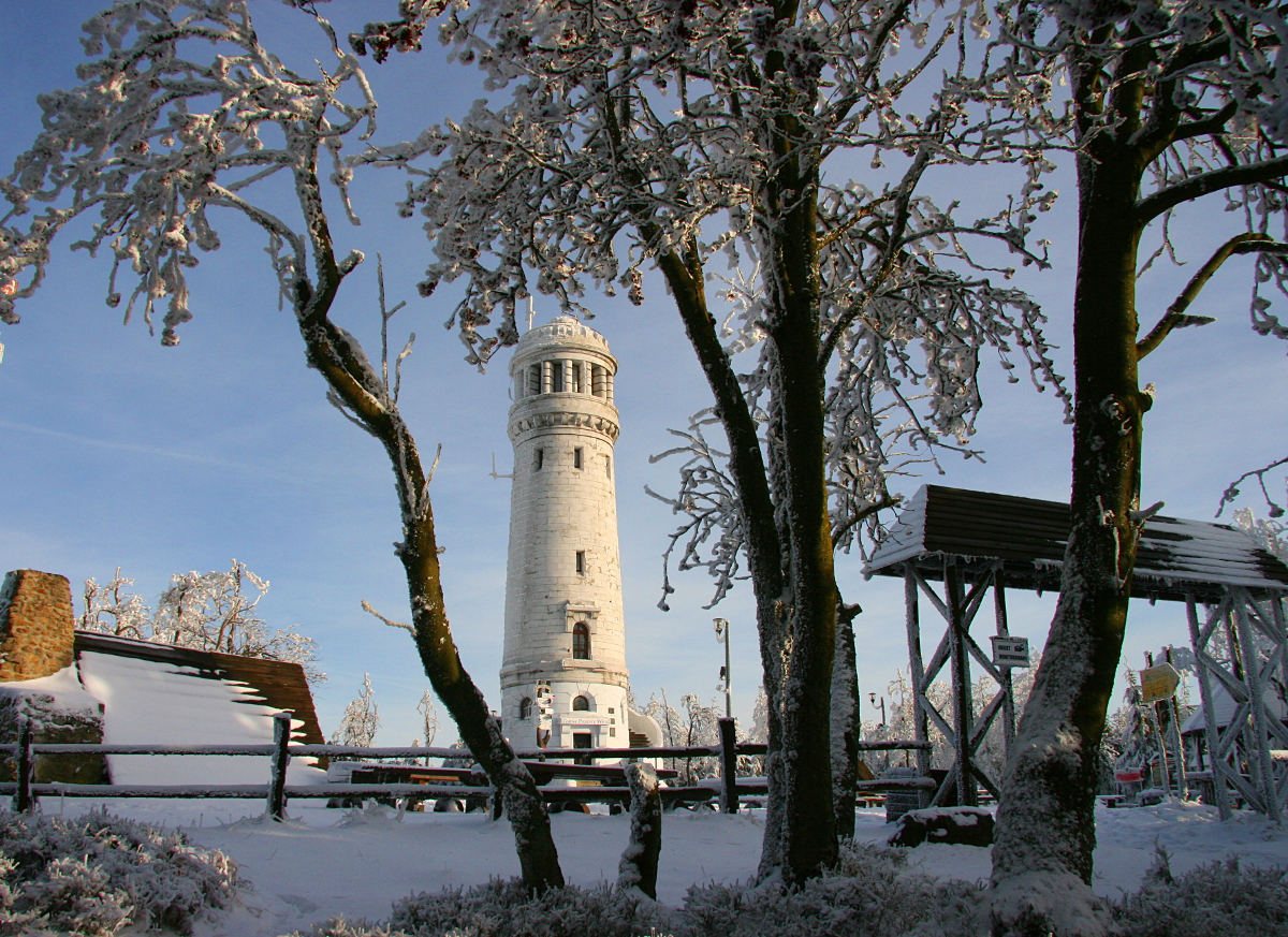 Wieża Bismarcka na Wielkiej Sowie (Gmina Pieszyce), która została wyremontowana i ponownie udostępniona turystom.